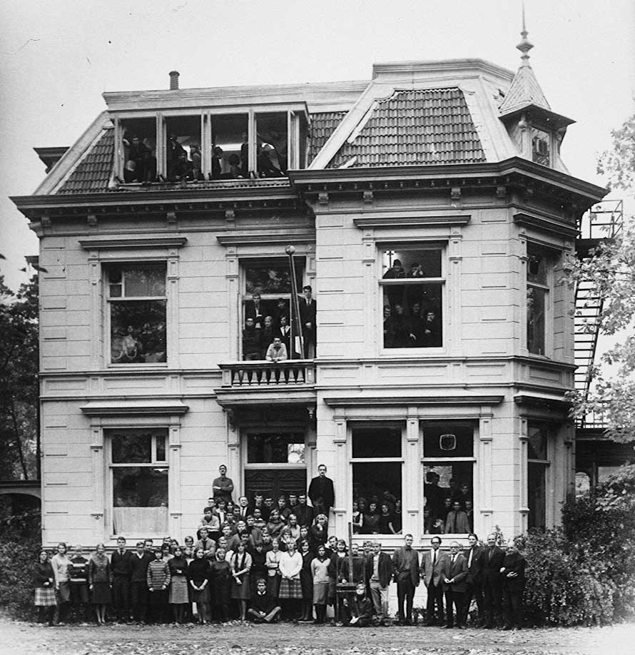 Afscheid aan de villa aan de Hengelosestraat, oktober 1964.